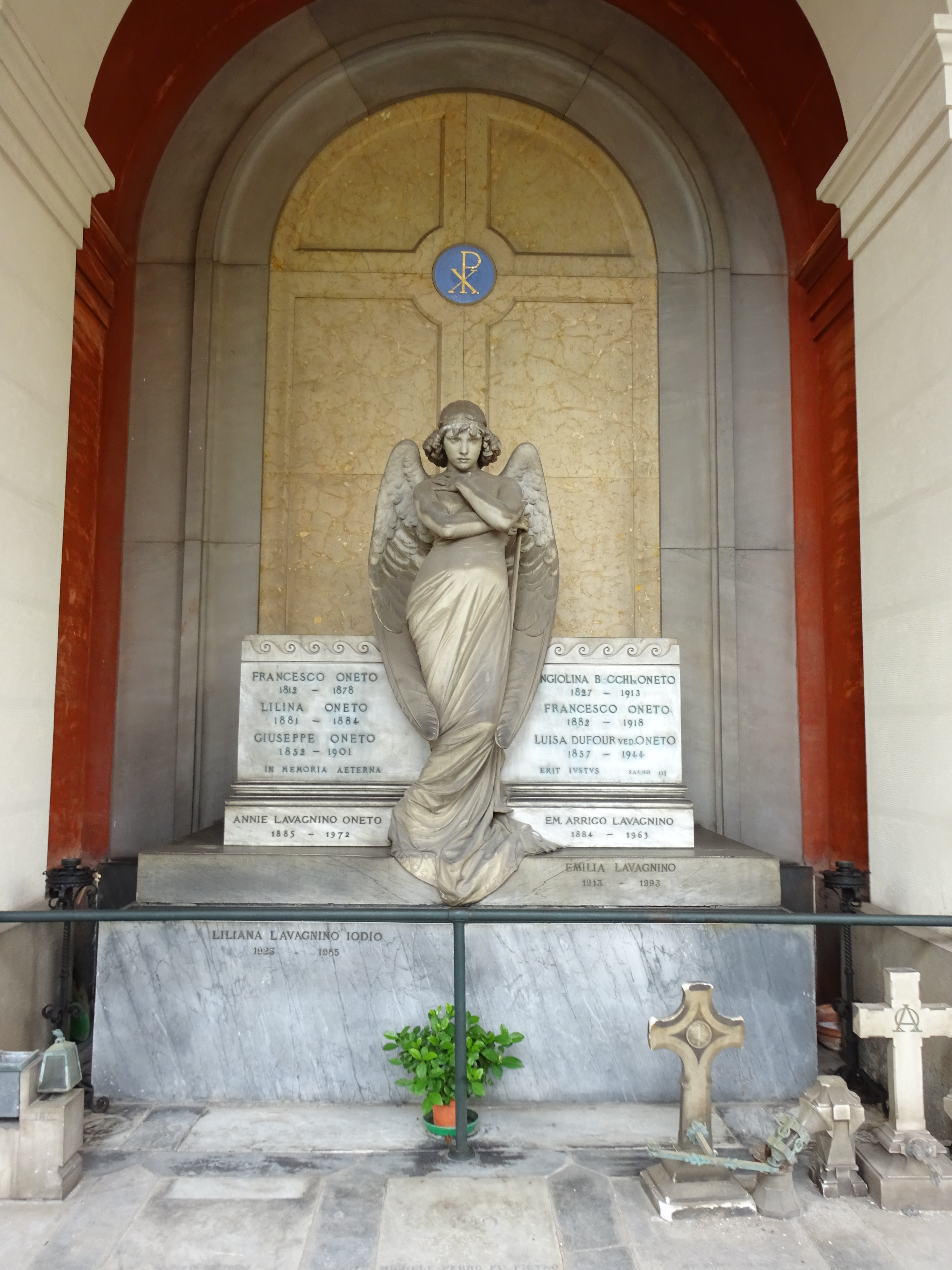 Cimitero di Staglieno - Tomba Famiglia Oneto, opera di Giulio Monteverde (Porticato superiore di ponente) This is a photo of a monument which is part of cultural heritage of Italy.